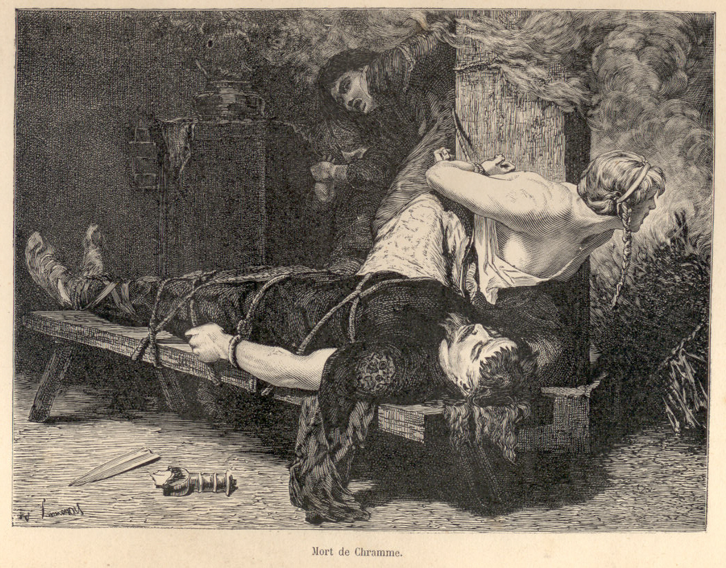 Gemälde/Stich: Mort de Chramme.